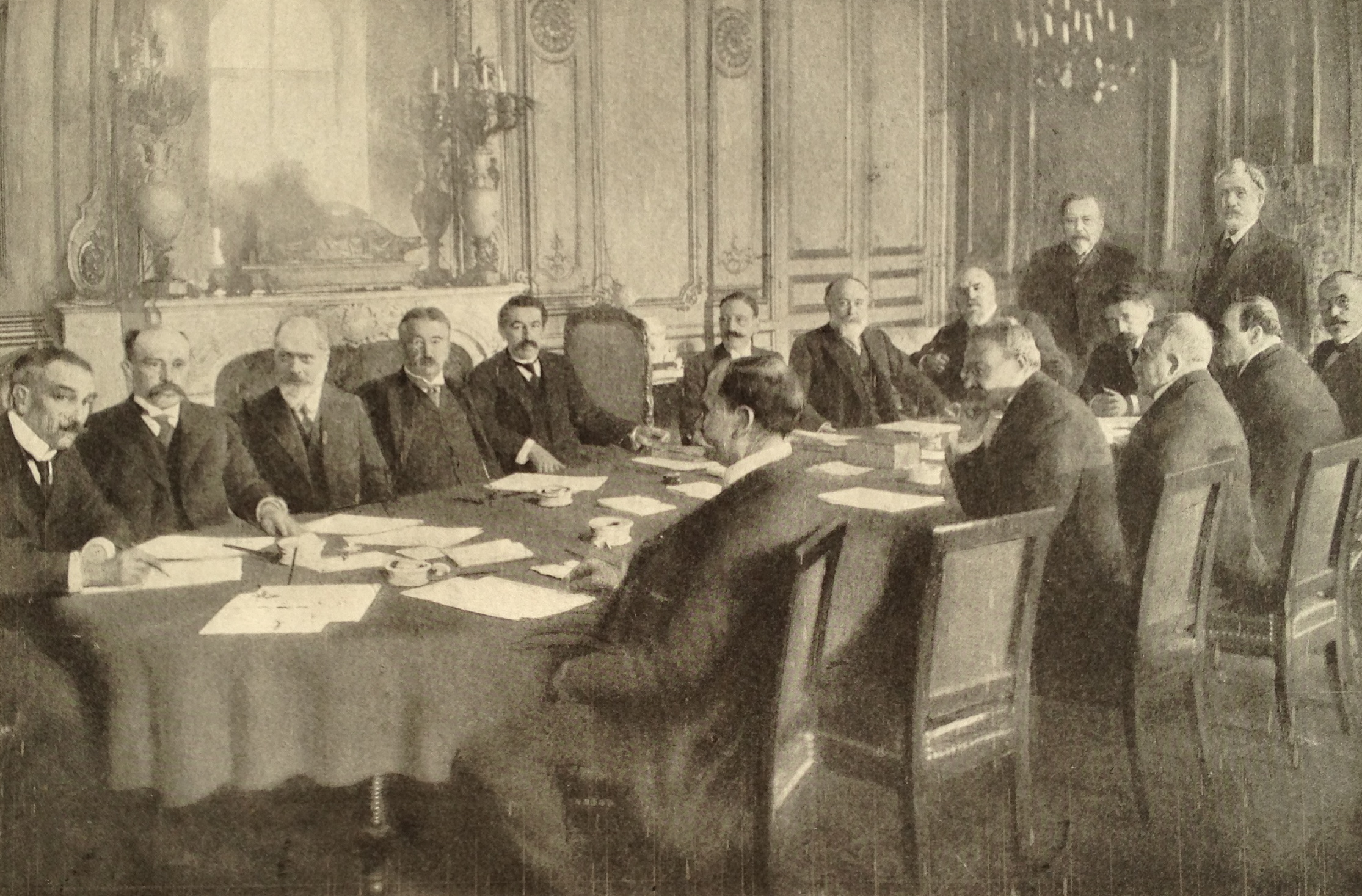 Conseil de cabinet du 7 novembre 1910 sous la présidence d'Aristide Briand (deuxième gouvernement Aristide Briand du 3 novembre 1910 au 2 mars 1911). Sont présents (tour de table depuis la gauche) : Sous-secrétaire d'État à la Marine : Gabriel Guist'hau Sous-secrétaire d'État à la Guerre : Joseph Noulens Ministre de l'Agriculture : Maurice Raynaud Ministre des Affaires étrangères : Stéphen Pichon Président du Conseil, ministre de l'Intérieur et des Cultes : Aristide Briand Ministre des Finances : Louis-Lucien Klotz Ministre de l'Instruction publique et des Beaux-Arts : Maurice-Louis Faure Sous-secrétaire d'État aux Beaux-Arts : Étienne Dujardin-Beaumetz Ministre du Commerce et de l'Industrie : Jean Dupuy Sous-secrétaire d'État aux Finances : André Lefèvre Ministre de la Marine : Auguste Boué de Lapeyrère Ministre du Travail et de la Prévoyance sociale : Louis Lafferre Ministre des Travaux publics, des Postes et Télégraphes : Louis Puech Ministre de la Guerre : Jean Brun Ministre de la Justice : Théodore Girard Ministre des Colonies : Jean Morel